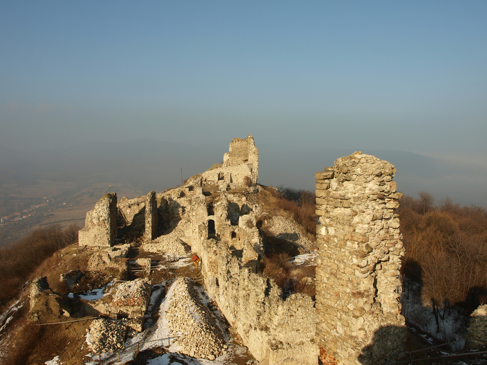 Várrom (Mogyoróska, Regéci vár, külterület) This is a photo of a monument in Hungary. Identifier: 2996